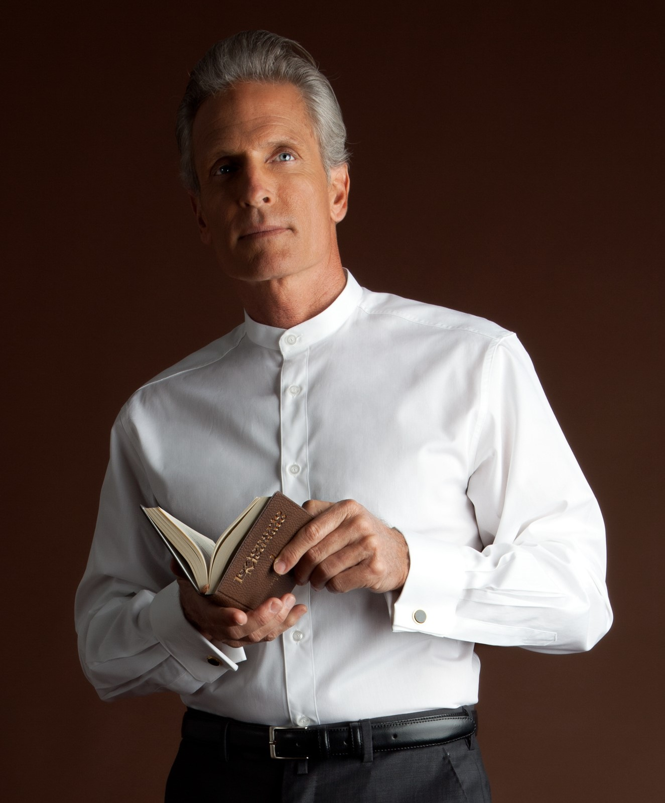 El excelente y fidelísimo caballero y reverendo padre Carlos Julià Braun, PhD, protodiácono de Vritomartis, conde de Sfakiá, conde palatino de El Masnou, caballero de la Santa Orden Ecuestre y Católica de Simón Pedro, oficial de la Corona de Escocia, caballero oficial de la Orden Imperial y Nobiliaria de la Corona Heracliana de Constantinopla, caballero oficial de la Orden Nobiliaria de los Caballeros de San Romedio. Poeta satírico.